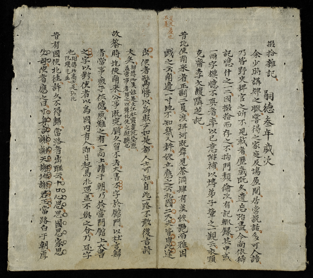 "Xuyet Thap Tap Ky(《掇拾雜記》)